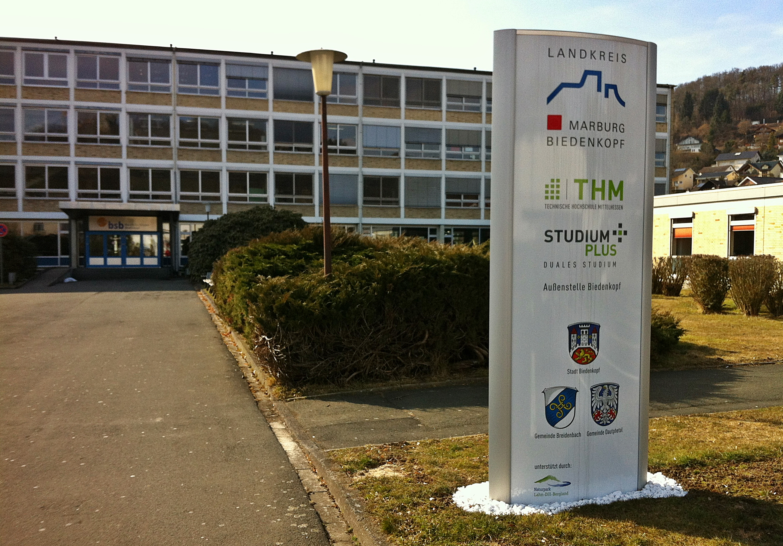 Deutschland, Hessen, Biedenkopf: Studium Plus; Nebenstelle Biedenkopf der Technischen Hochschule Mittelhessen auf dem Gelände der Beruflichen Schulen.